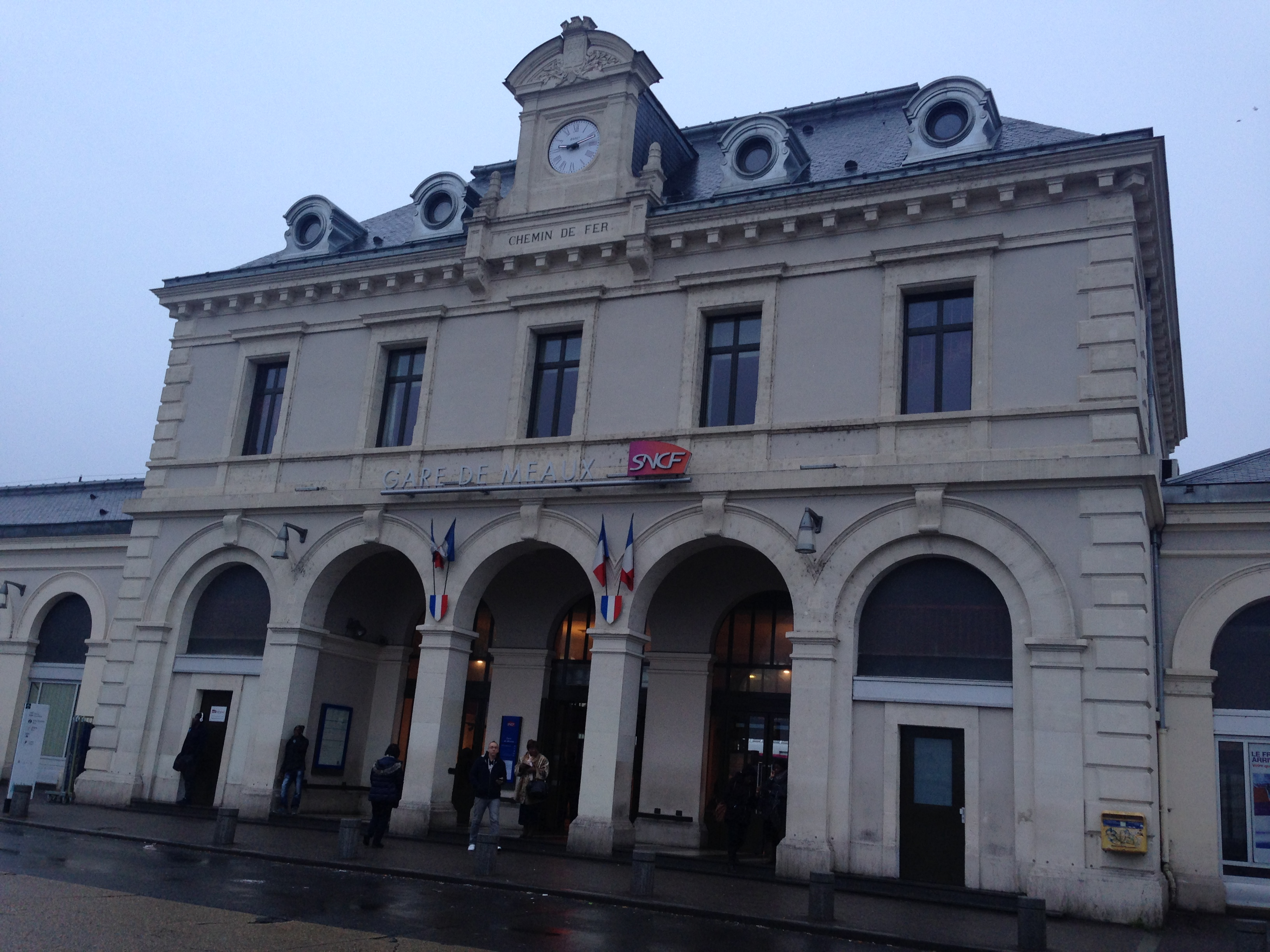 Gare de Meaux-2016